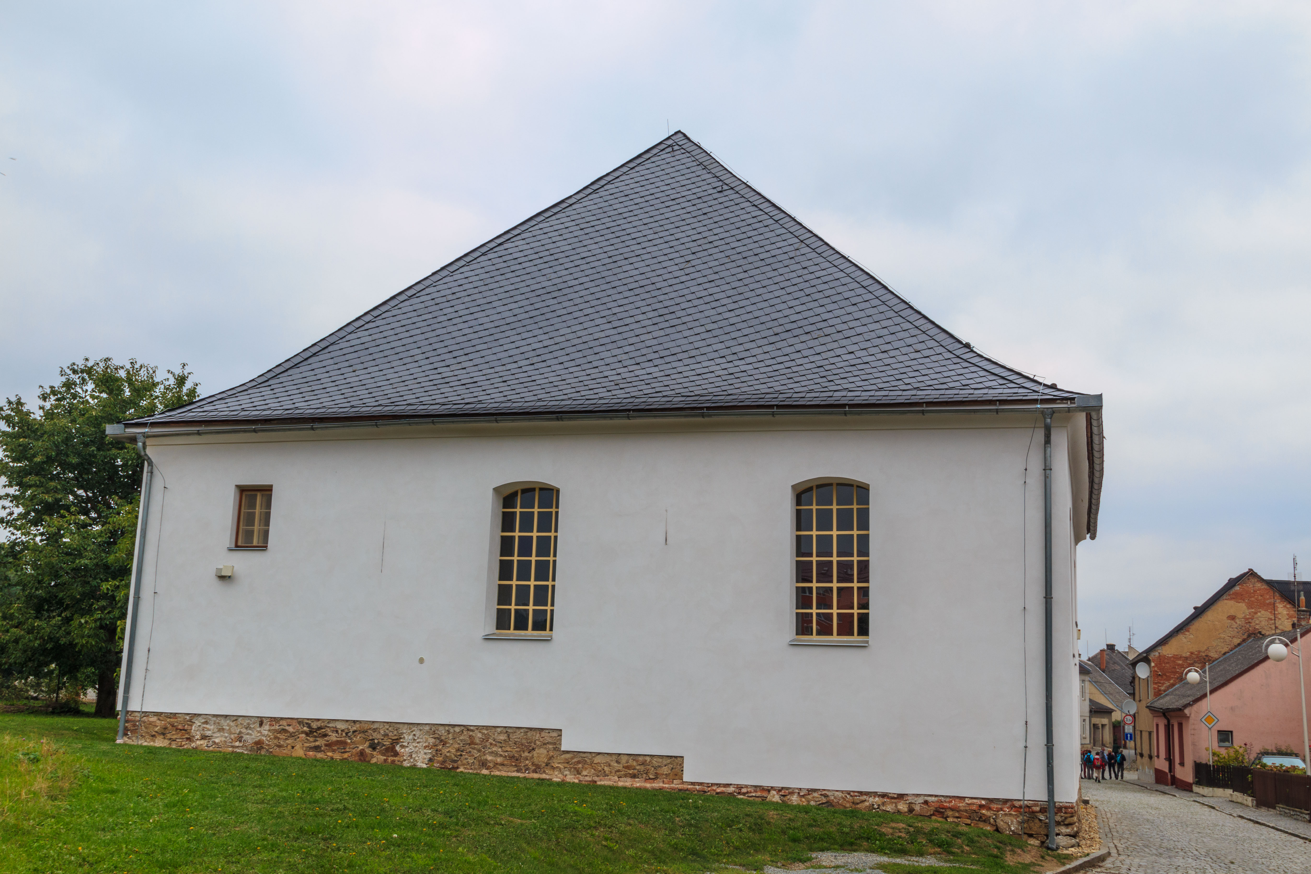 Synagoga, Ztracená 619/20, Loštice.